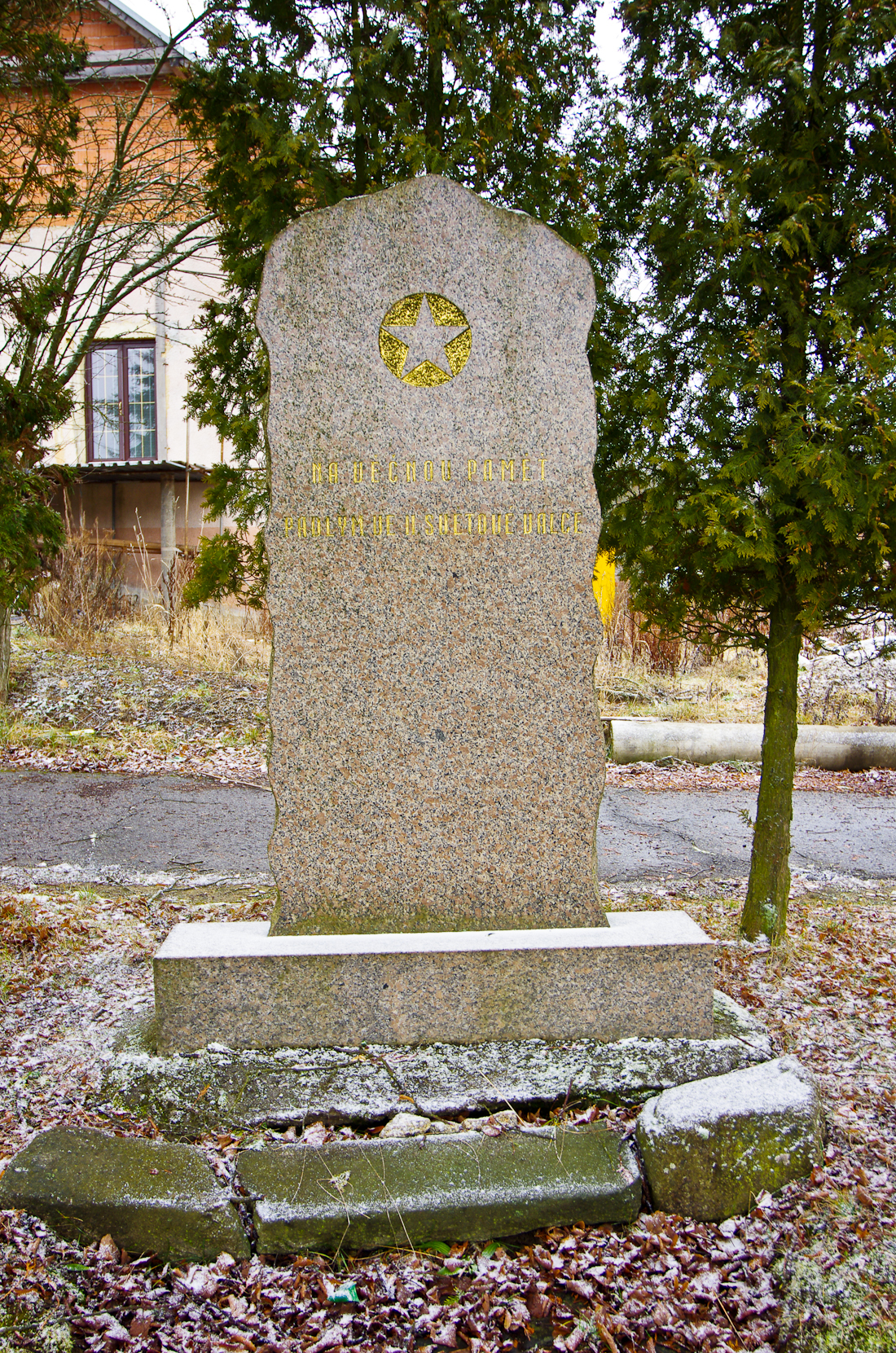 Jindřichovice, Krušné hory, okres Sokolov, památník obětem 2. světové války